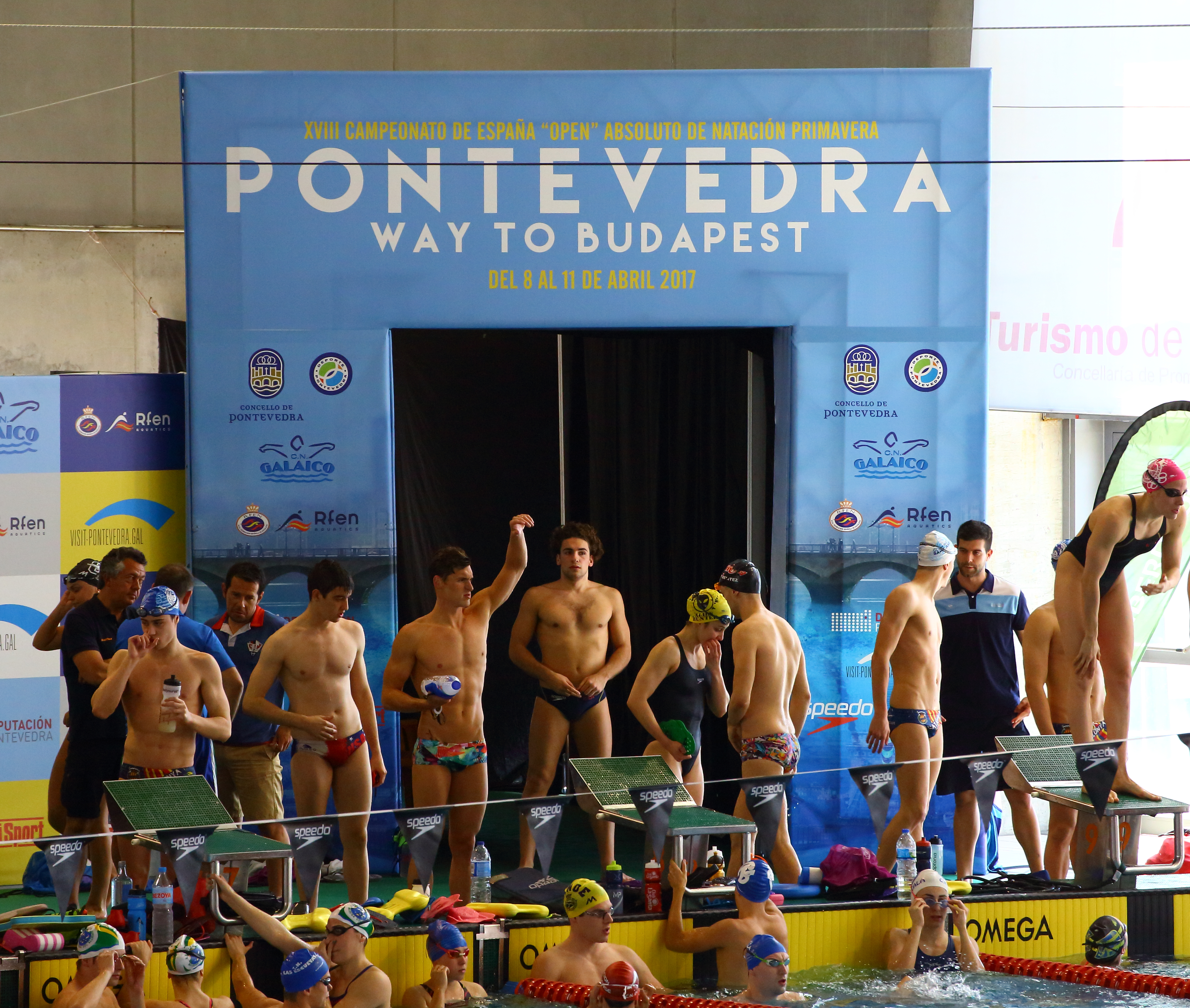 Entrada principal de los deportistas